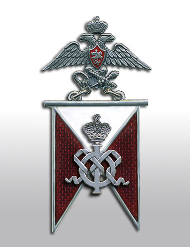 Badge of Kavalergardsky Regiment